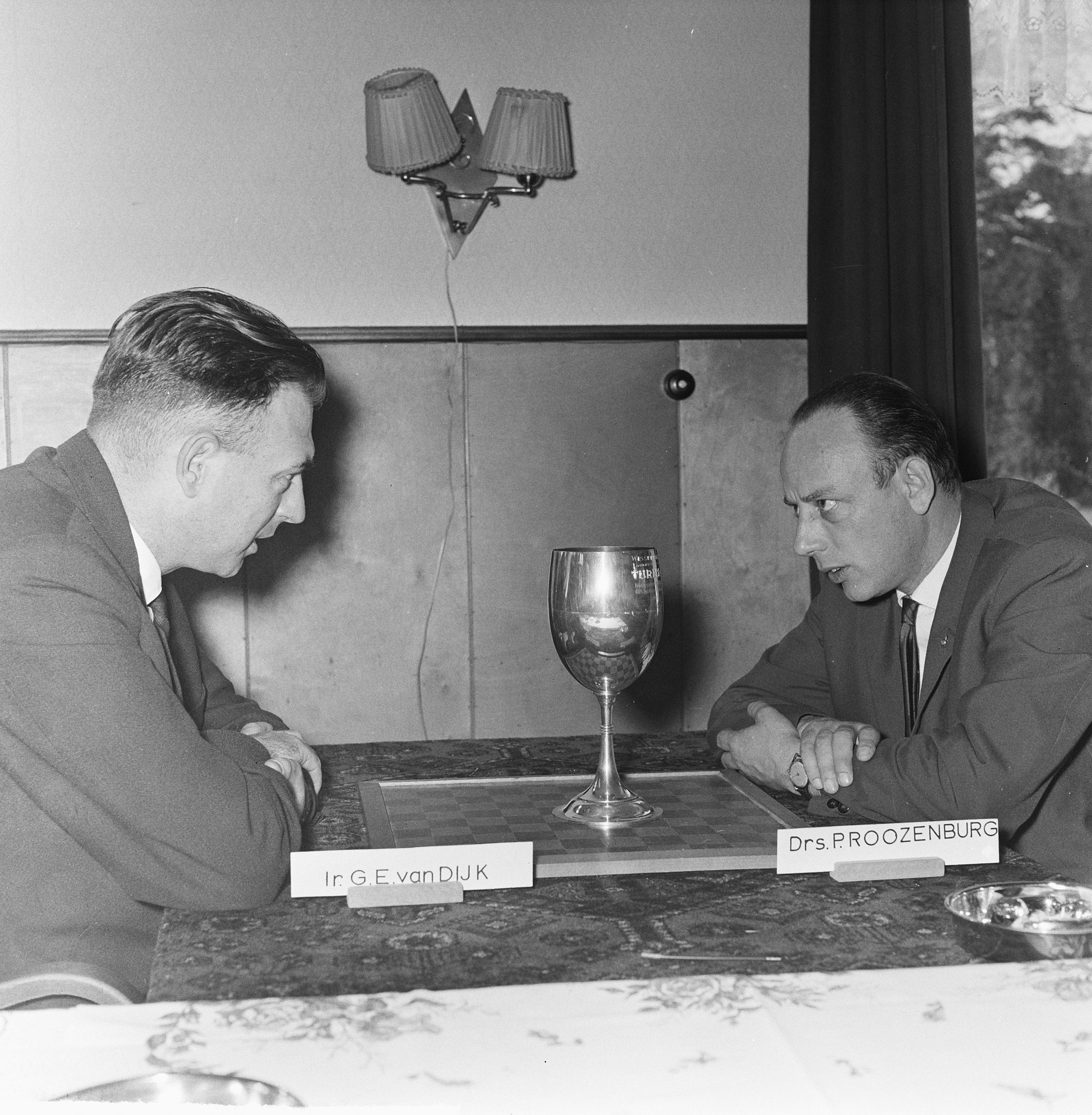 Collectie / Archief : Fotocollectie Anefo Reportage / Serie : [ onbekend ] Beschrijving : Kampioenschap dammen te Apeldoorn, Van Dijk (links) en Roozenburg kijken naar de beker Datum : 25 april 1965 Locatie : Apeldoorn, Gelderland Trefwoorden : DAMMEN, KAMPIOENSCHAPPEN, bekers Fotograaf : Kroon, Ron / Anefo Auteursrechthebbende : Nationaal Archief Materiaalsoort : Negatief (zwart/wit) Nummer archiefinventaris : bekijk toegang 2.24.01.03 Bestanddeelnummer : 917-6830